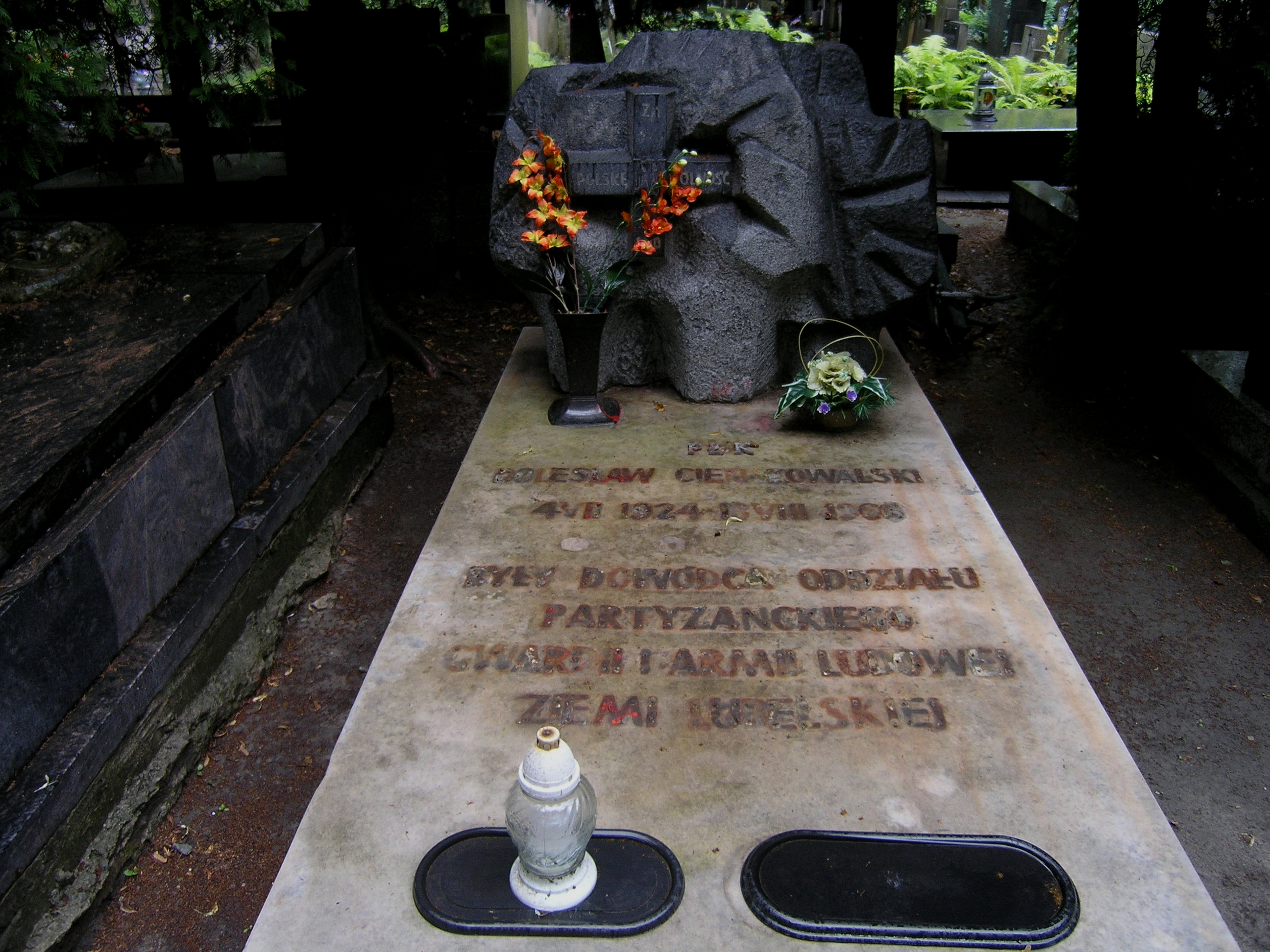 Grób płk. Bolesława Kaźmiraka vel Bolesław Cień-Kowalski na Cmentarzu Wojskowym na Powązkach w Warszawie